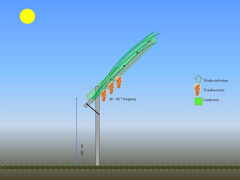 Einseitige Schägspaliererziehung